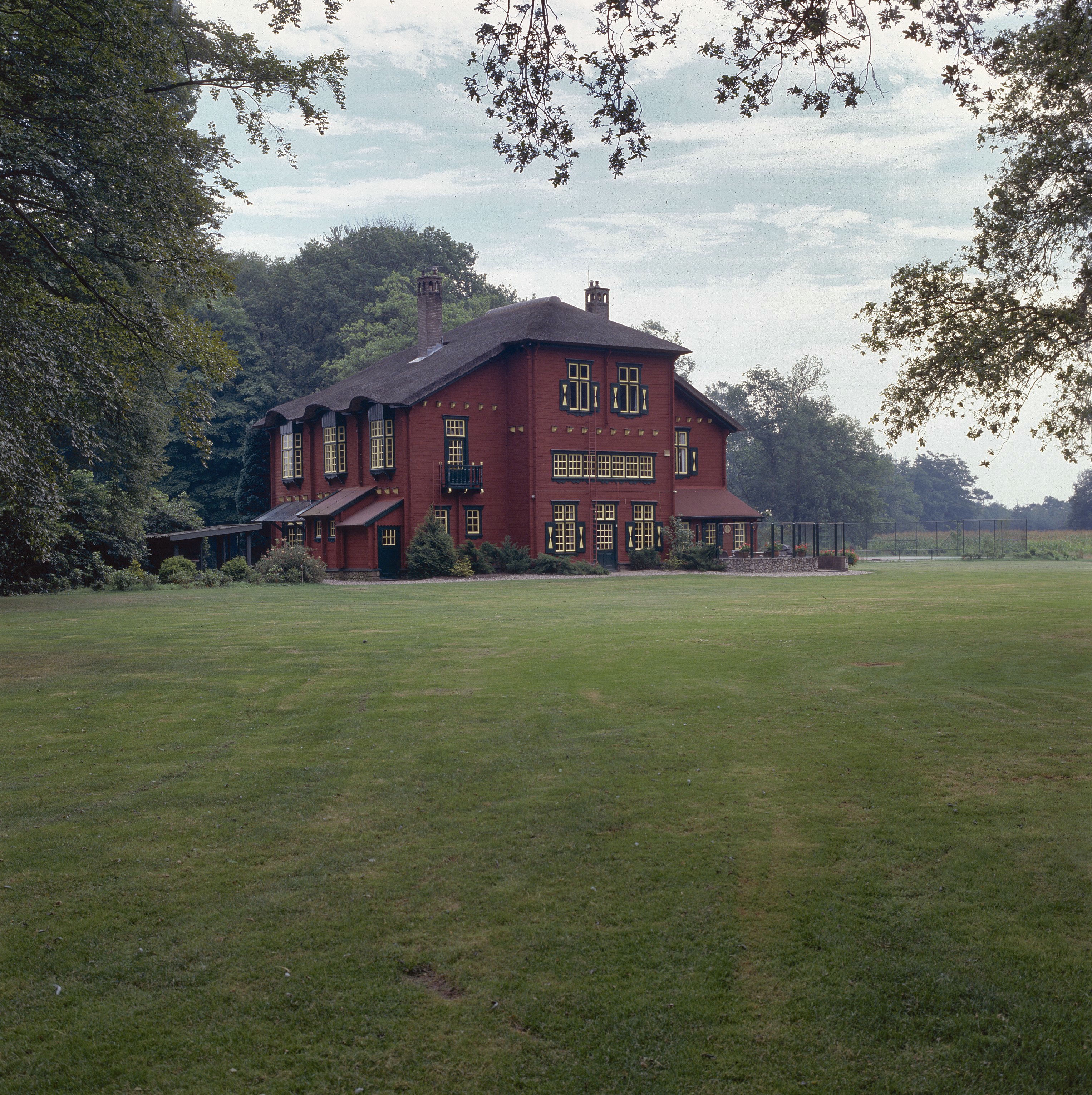 De Hermanshoeve: Overzicht voorgevel en linker zijgevel, landhuis (opmerking: Gefotografeerd voor Monumenten In Nederland Overijssel)